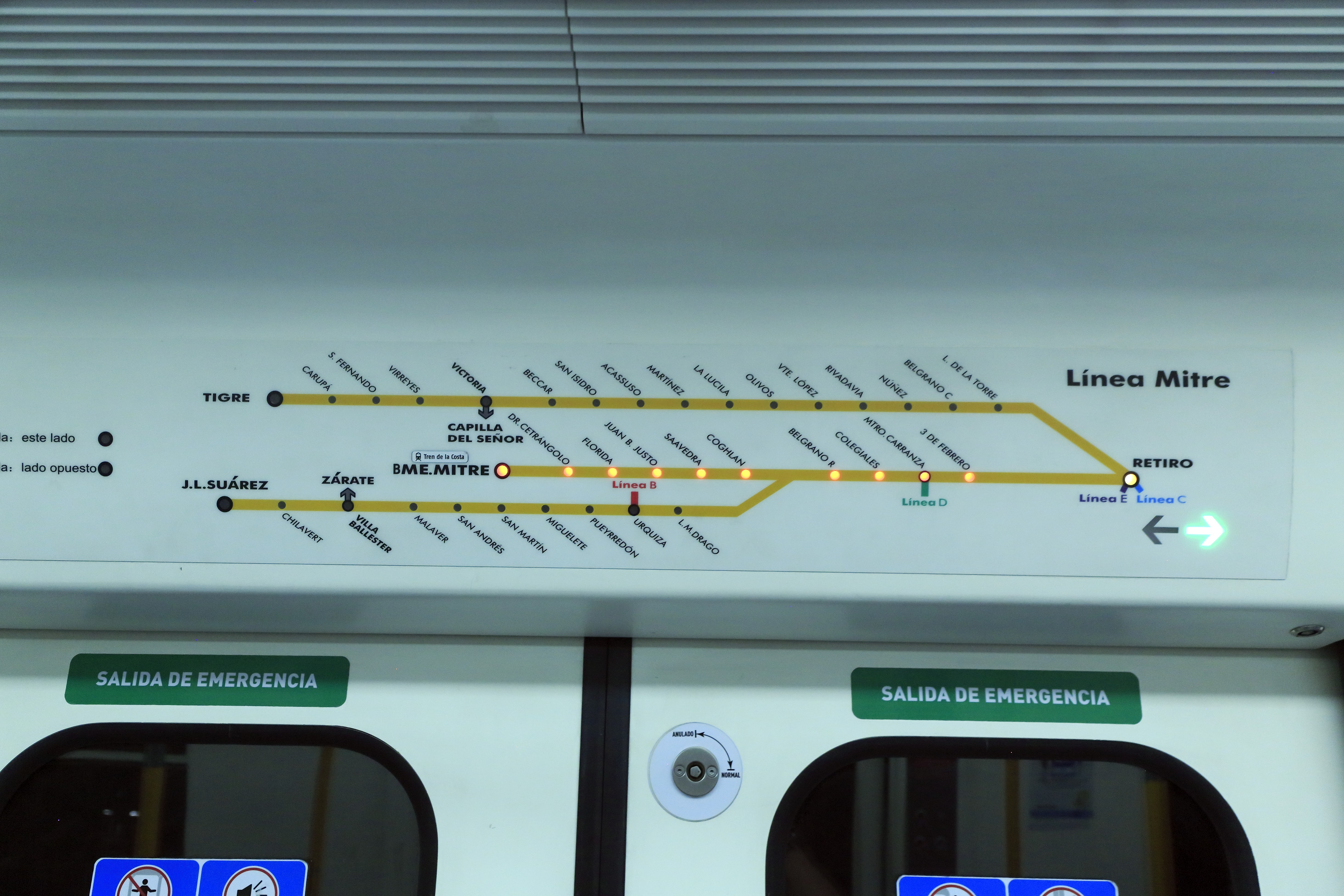 Perlschnüre über den Türen, die LED zeigen den Zuglauf, die bereits passierten und die nächste Zugangssstelle an. Im Bild erreicht der von Bartolomé Mitre kommende Zug in Kürze den Endpunkt Retiro.